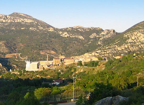 La Riba, municipi de l'Alt Camp, Catalunya.